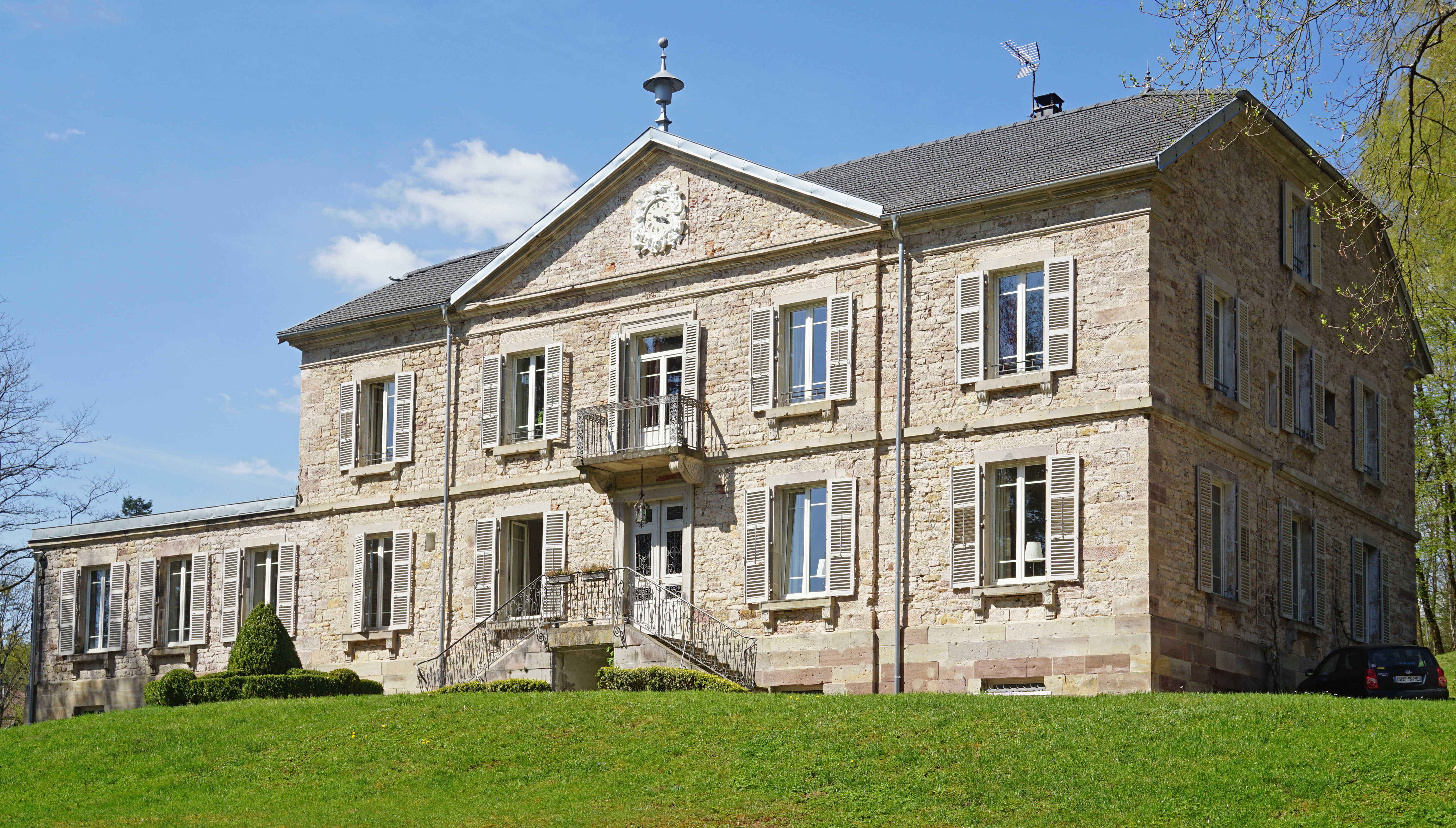 Le château de La Houillère.